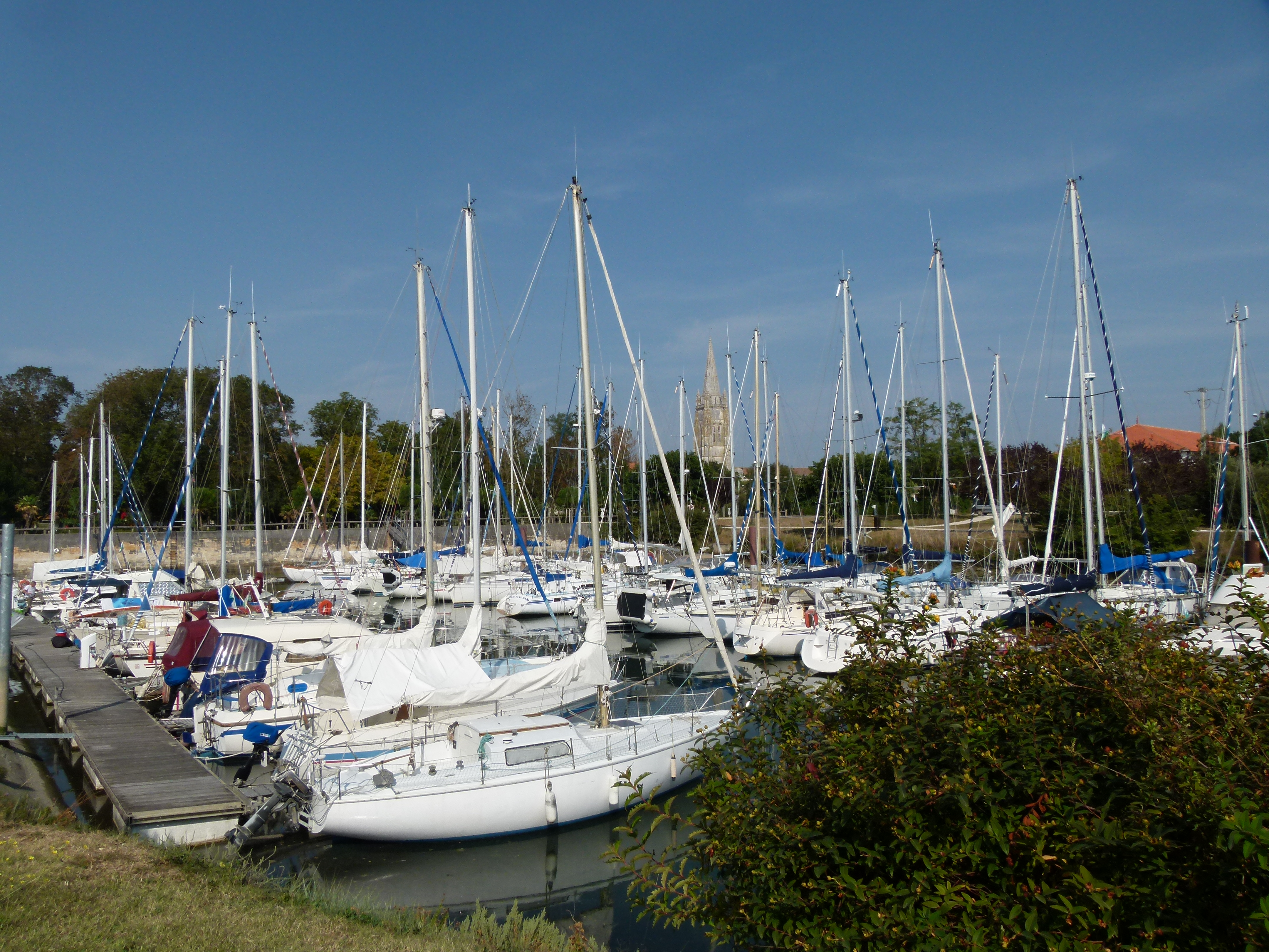 Le port de plaisance de Marennes est le plus important port fluvial de plaisance de Charente-Maritime après celui de Rochefort.